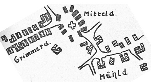 Skizze der Siedlungsformen des Ortes Kröbeln